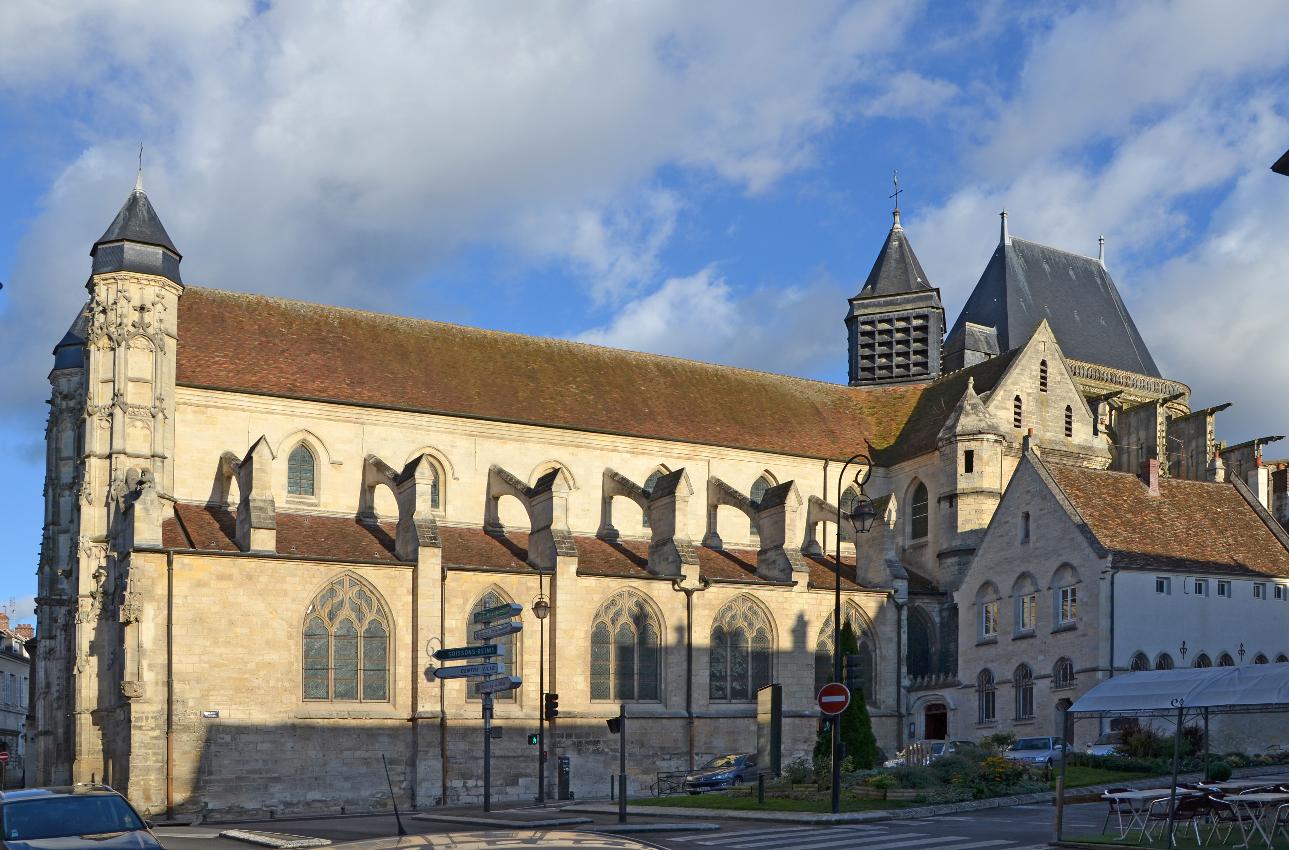 Église Saint-Antoine à Compiègne, Oise, Picardie, France